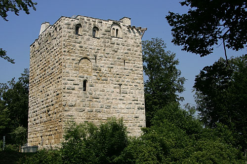 Turmruine Kastelen in Alberswil